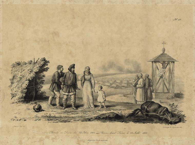 Беларуская (тарашкевіца): Дзісна (Dzisna)